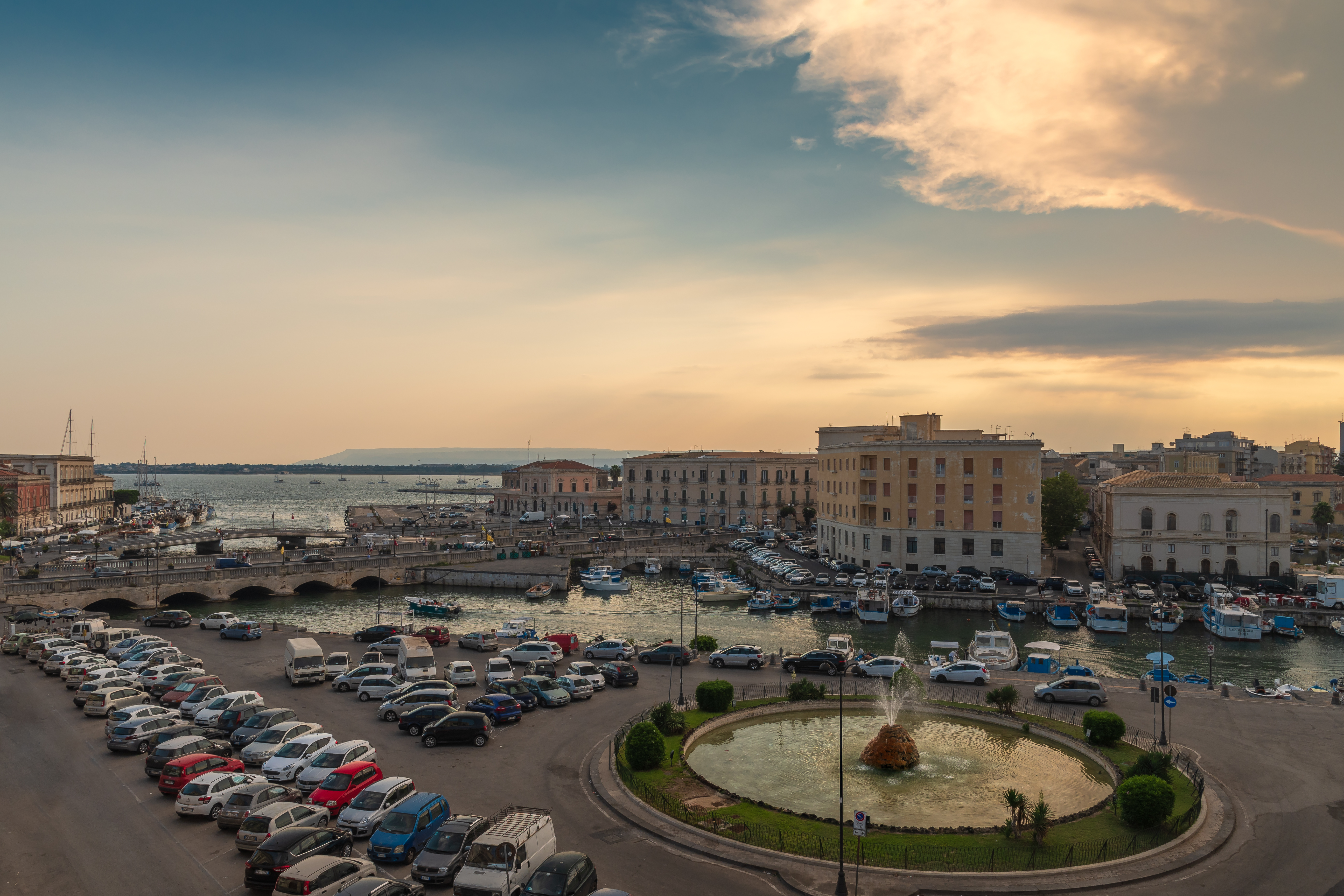 Die Insel Ortigia (Syrakus) mit südwestlichen Blick über den Hafen